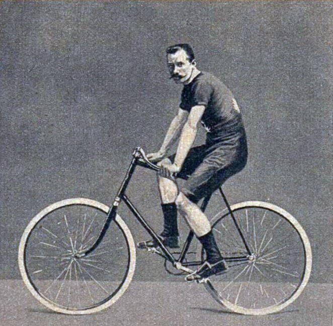 Henri Desgrange en 1893 (premier recordman cycliste de l'heure, à Buffalo - Paris).